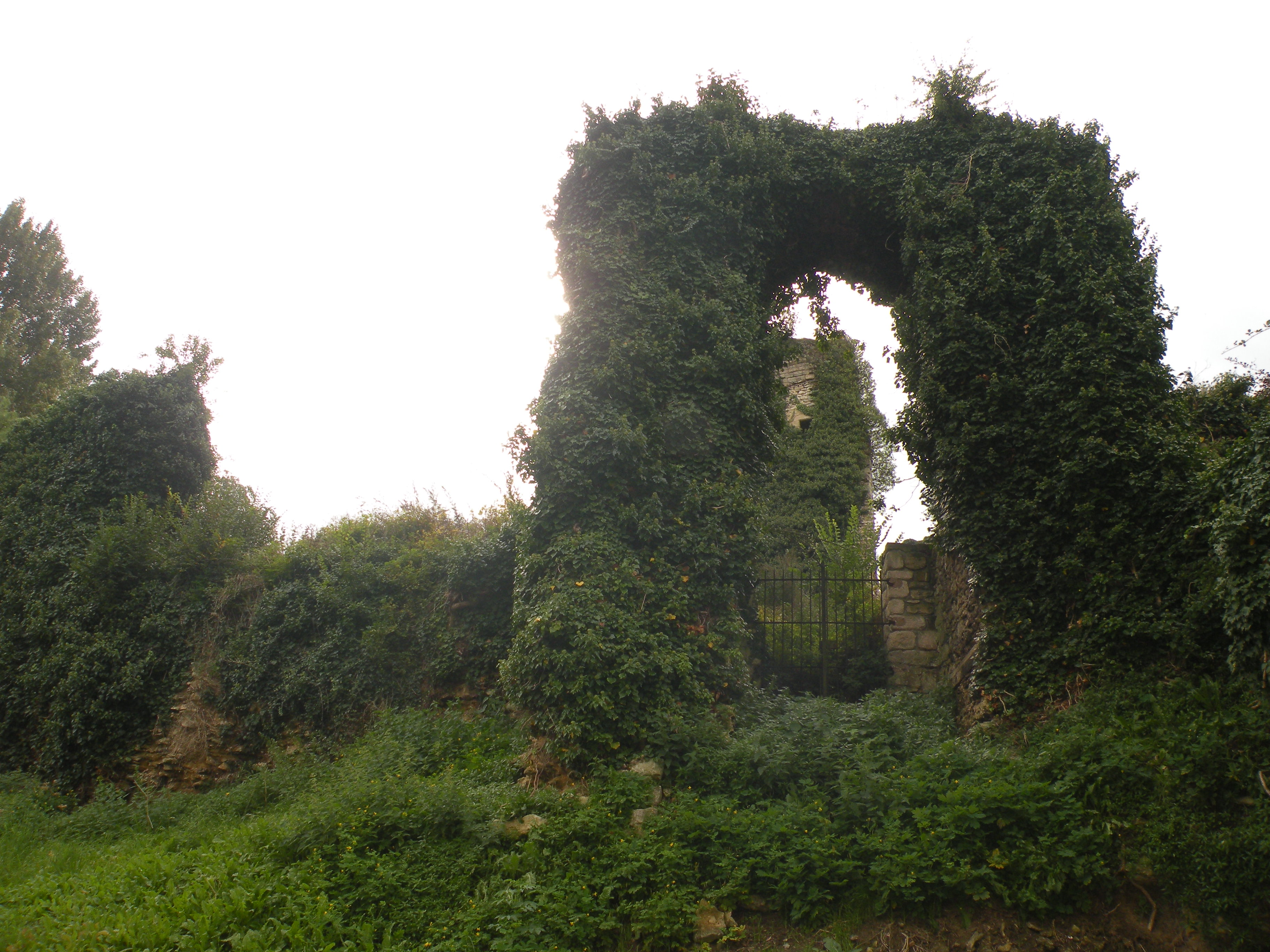 Château de Courcelles-lès-Gisors .